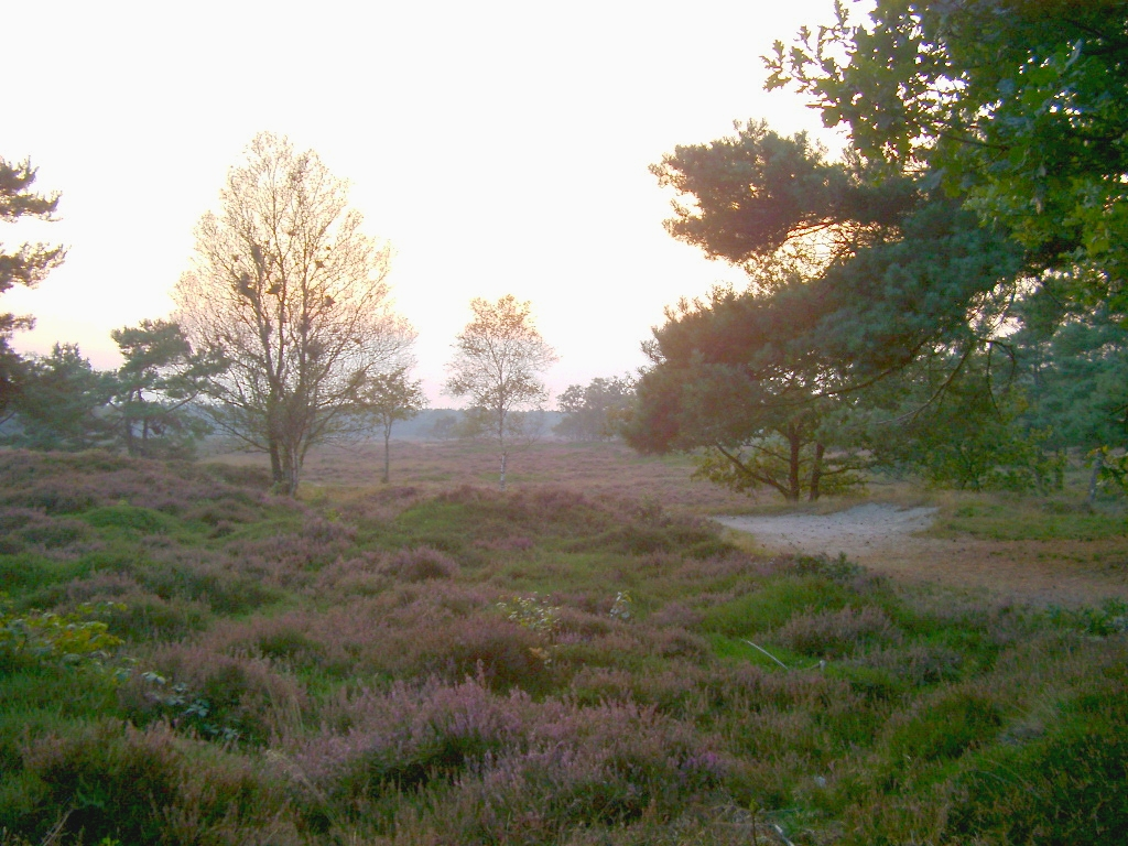 zelf gemaakte foto